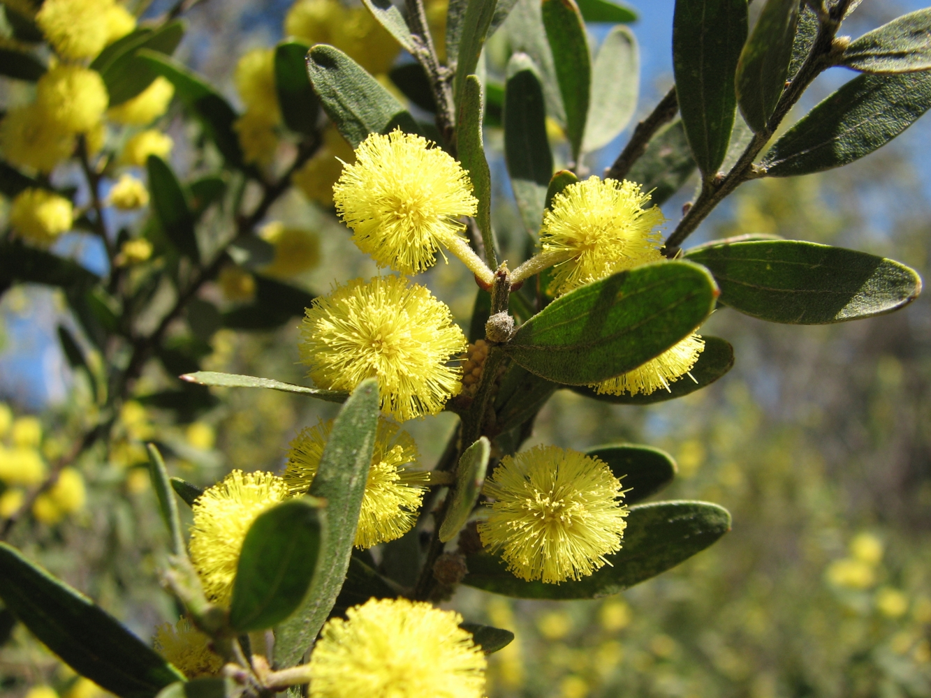 Acacia rostriformis, Coimadai, Victoria, Australia